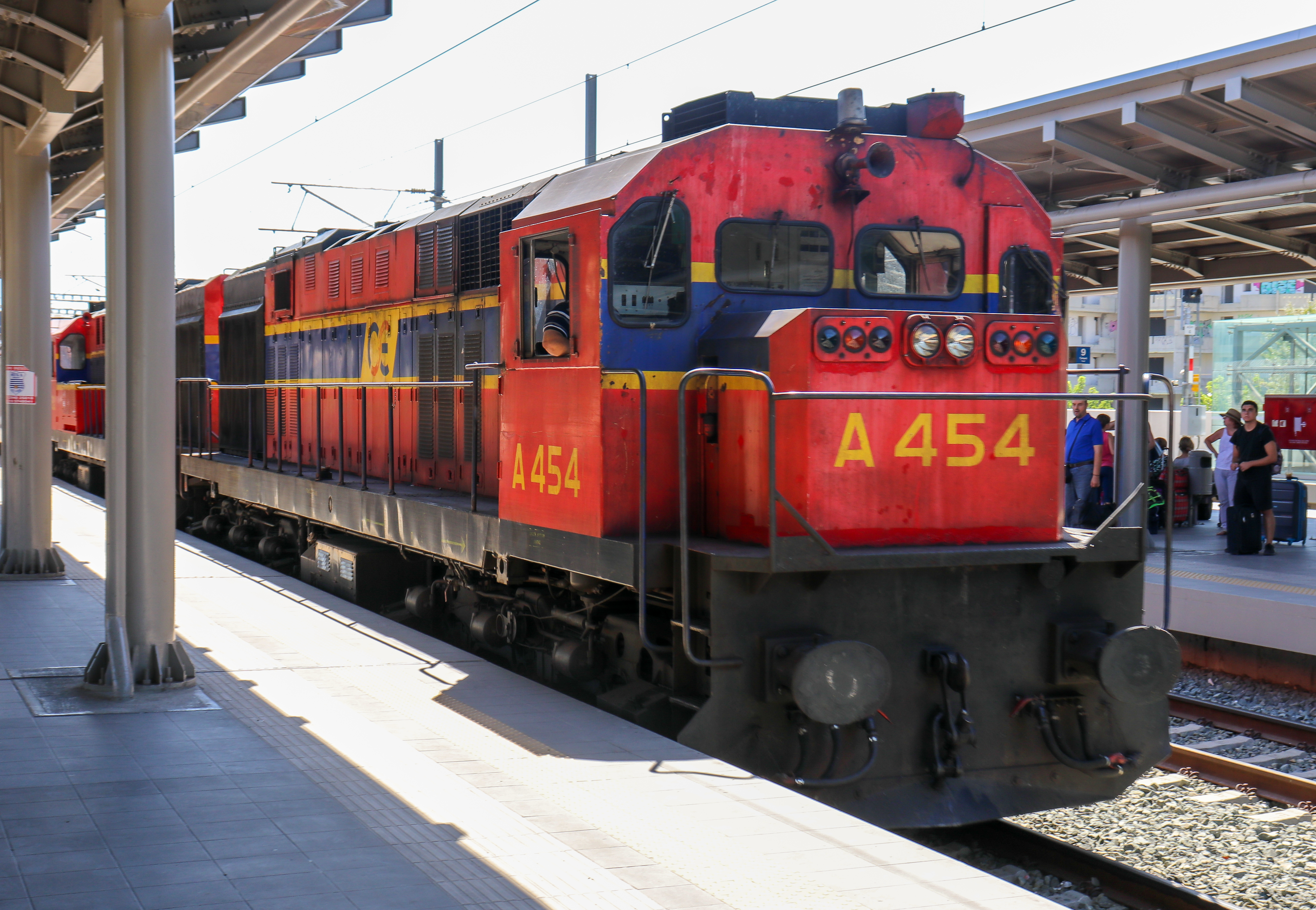 Железнодорожный Вокзал «Ларисса»